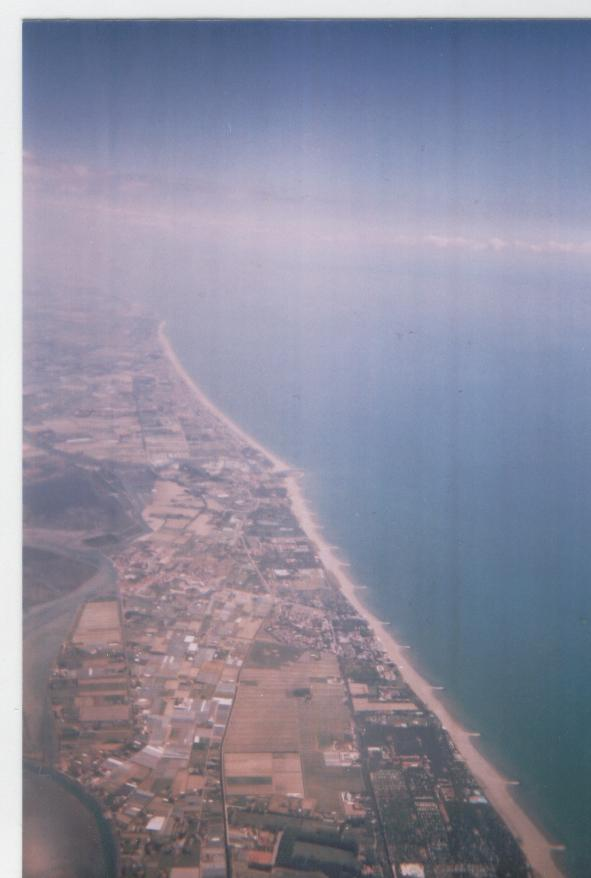 Visuale della laguna veneta dall'aereo